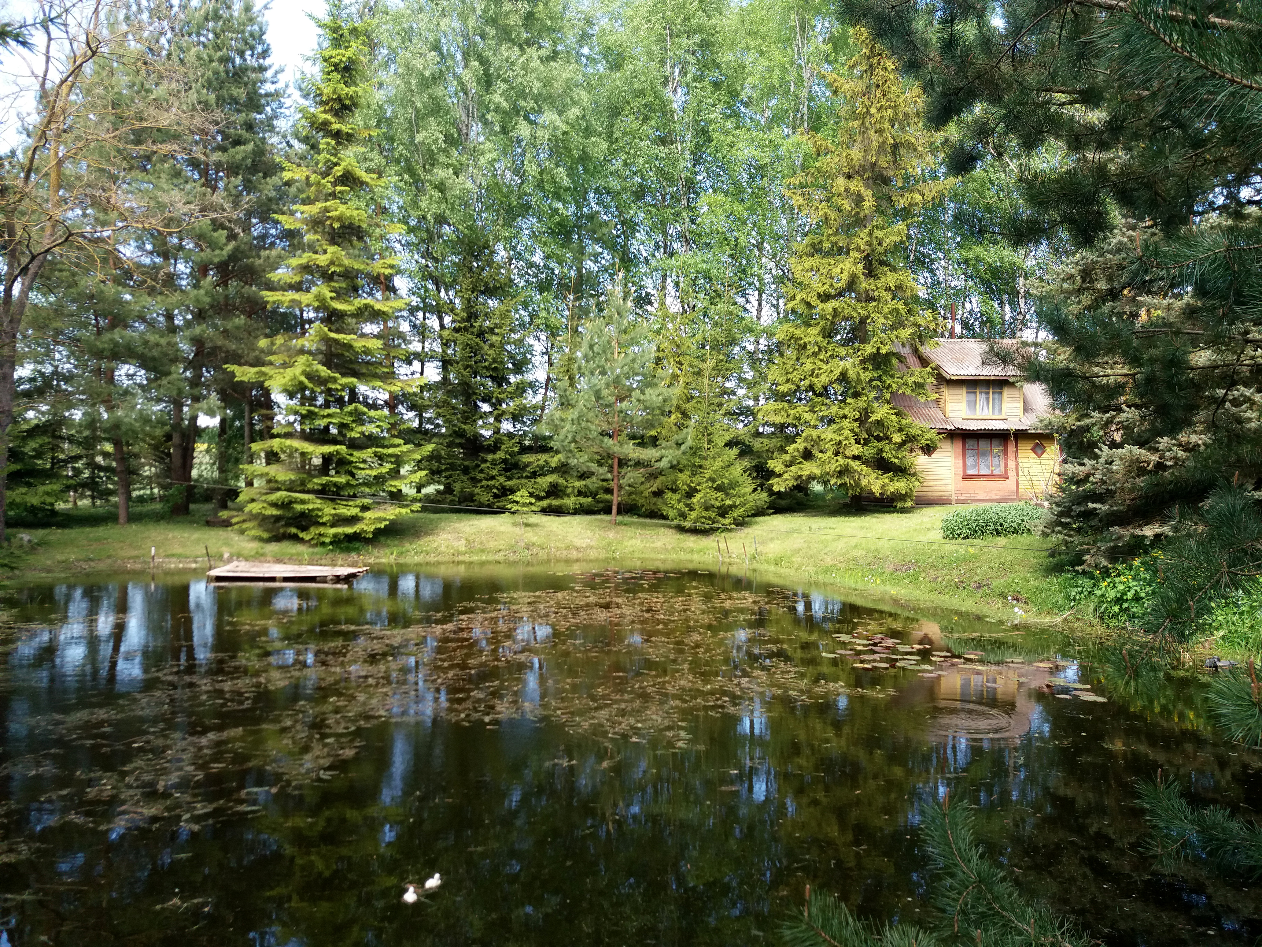 Paupliai sodželka